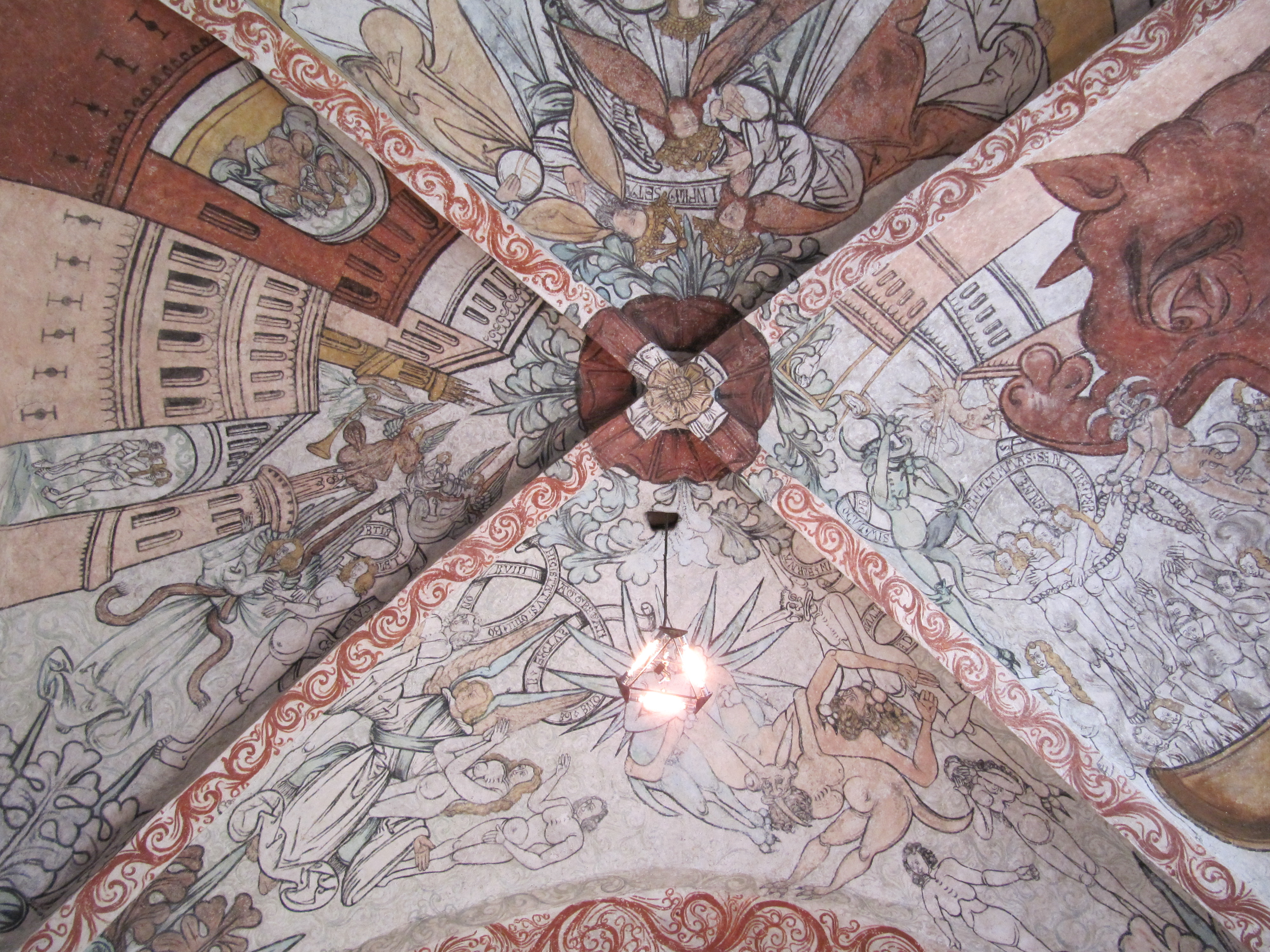 Korets takmålningar i Hjärsås kyrka